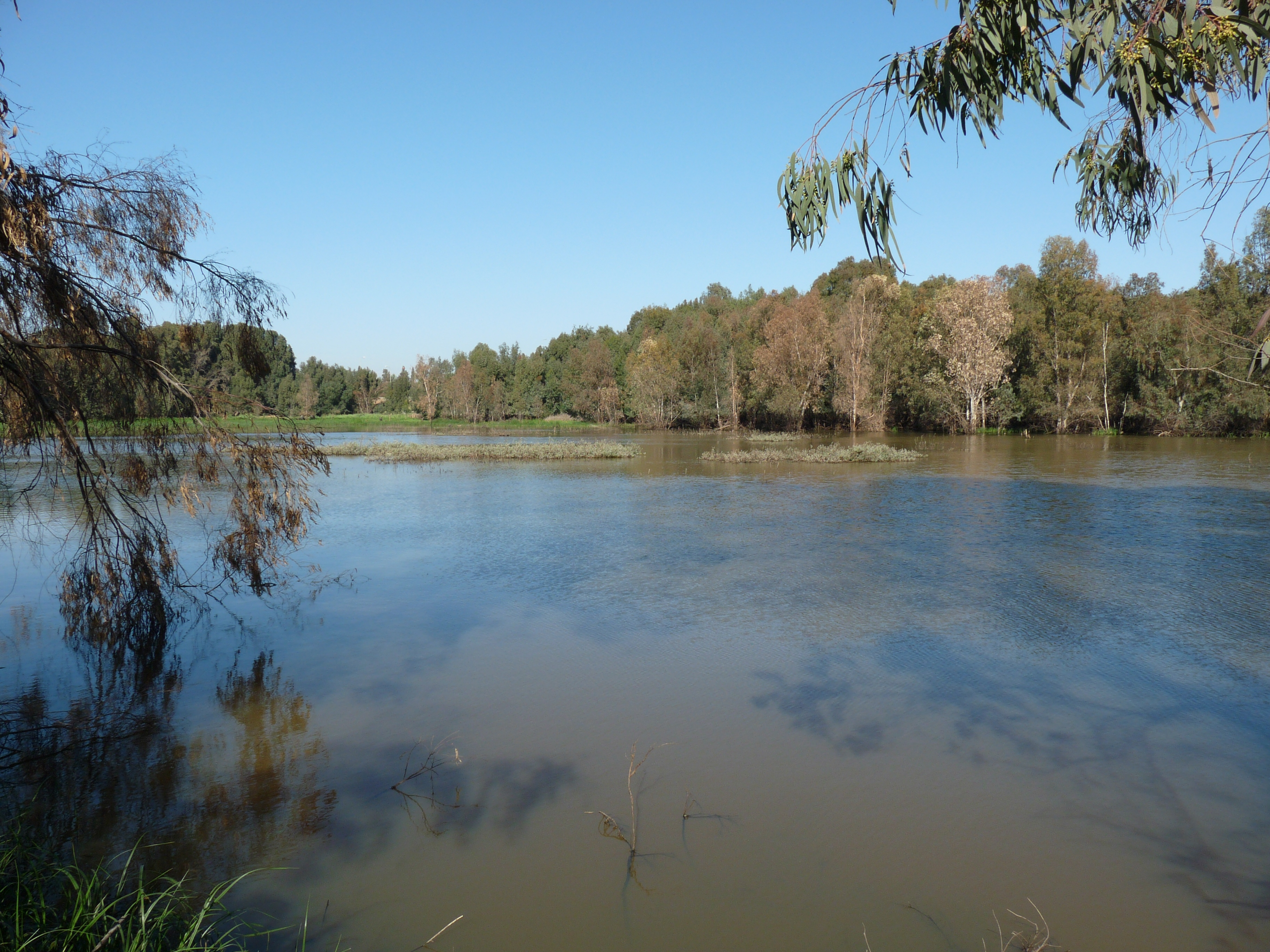 פארק השרון הוא גן לאומי לצד כביש 4 והכניסה אליו היא דרך תחנת רכבת חדרה-מערב. זהו שטח רחב-ידיים, מיוער בעצי חרוב ואלון התבור, שריד ליער אלונים גדול שכיסה פעם את האזור מצפון הארץ, סמוך לחרמון ועד נחל איילון בדרום.